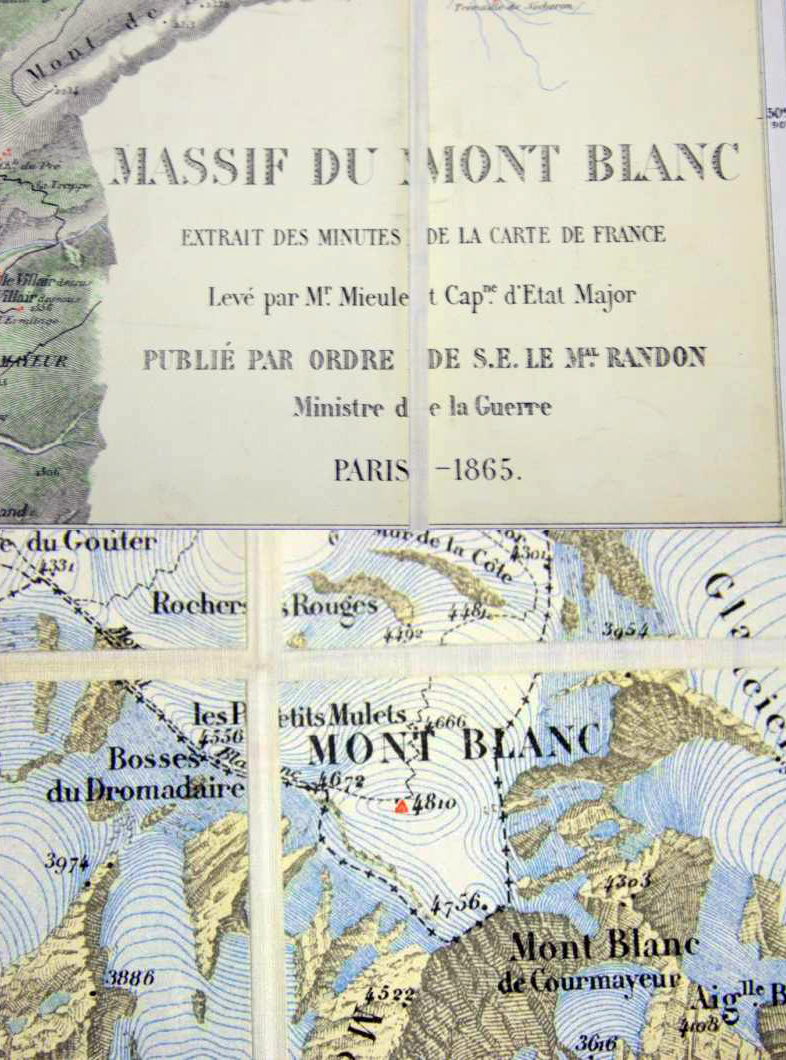 L'extrait de la carte publiée par le Dépot de la guerre à partir des levés du Capitaine Mieulet. Prix de l'édition originale : 1 Fr. Cette planche a été vendue jusqu'à la Seconde guerre mondiale.